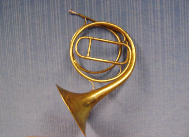 cor naturel phoebus an 1700 environ